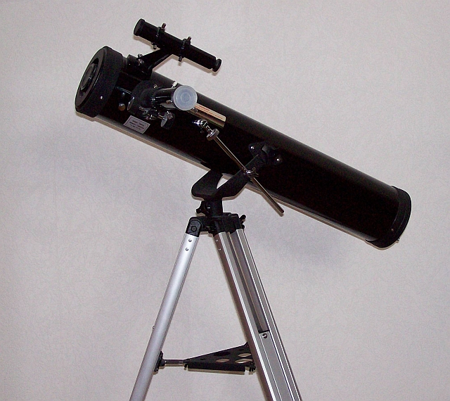 Spiegelteleskop (Reflektor) 76/700mm